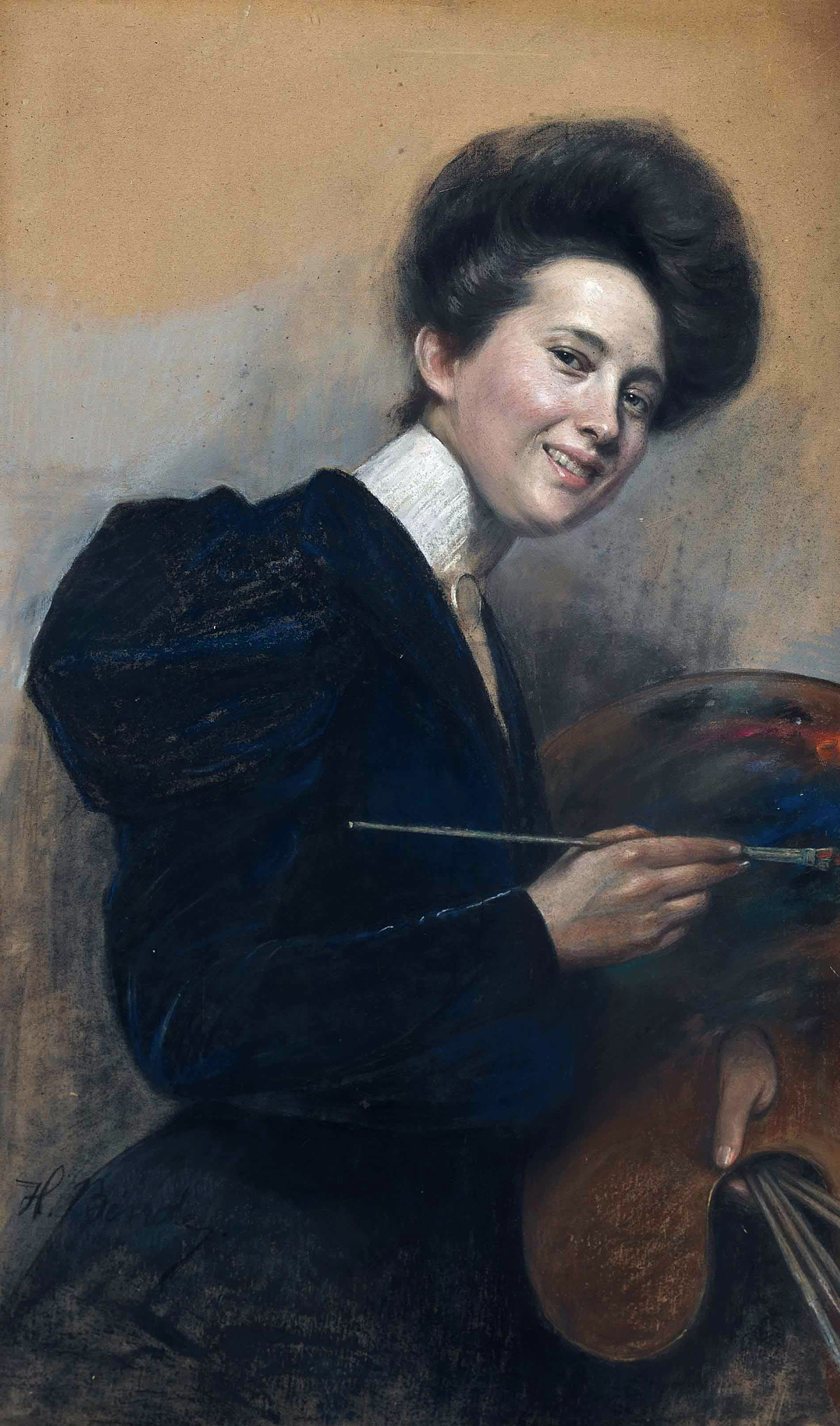 Self-portrait.